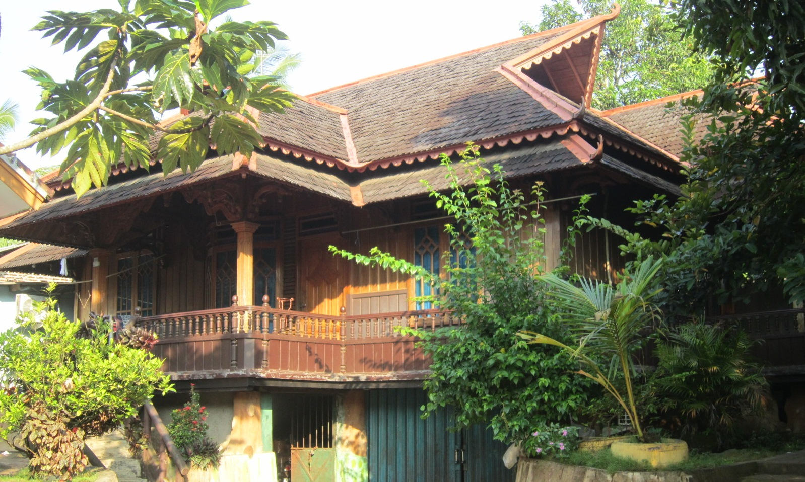 Pabri Garam Cap Burung Merpati